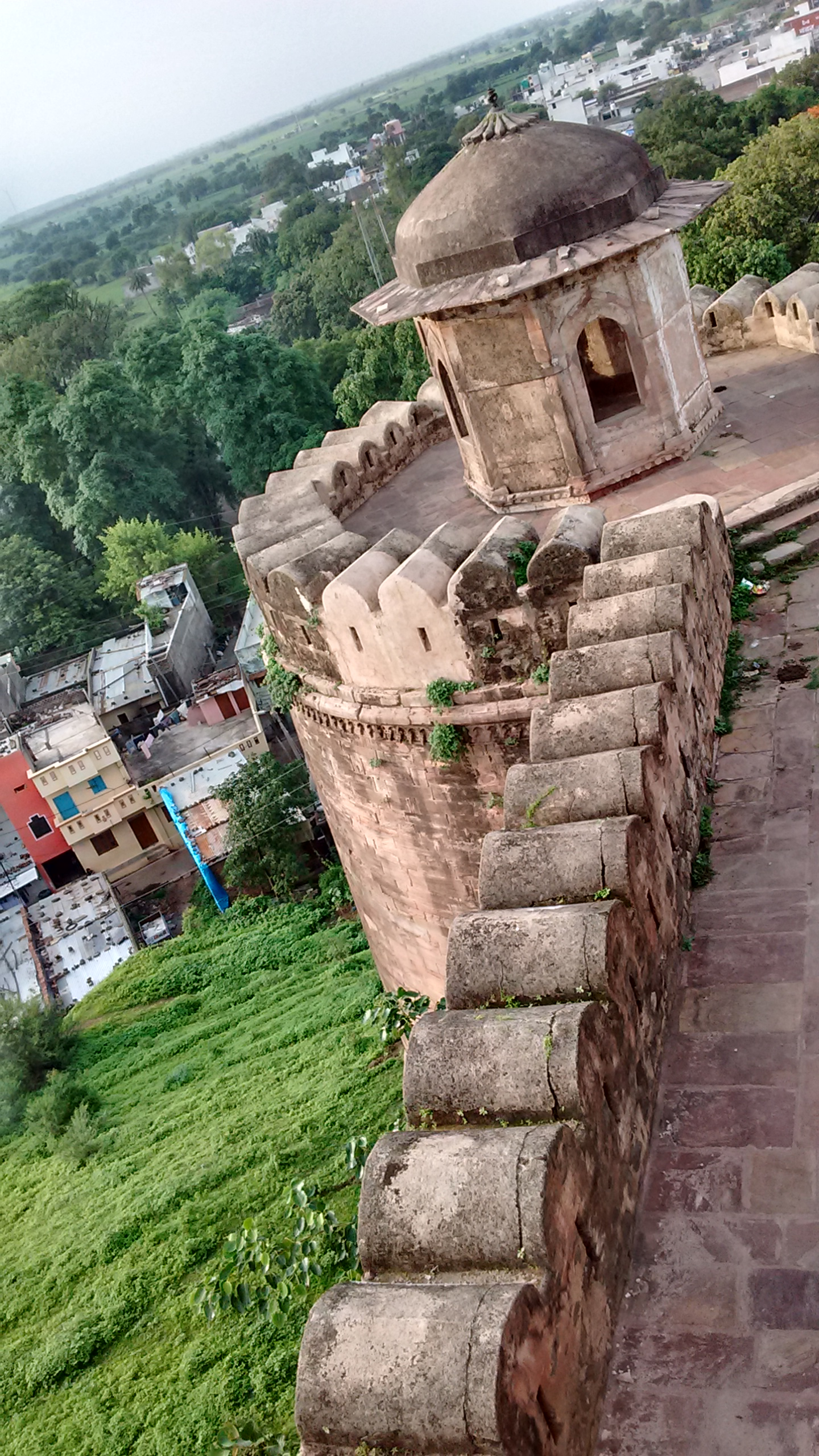 Dhar Fort, Dhar, Madhya Pradesh